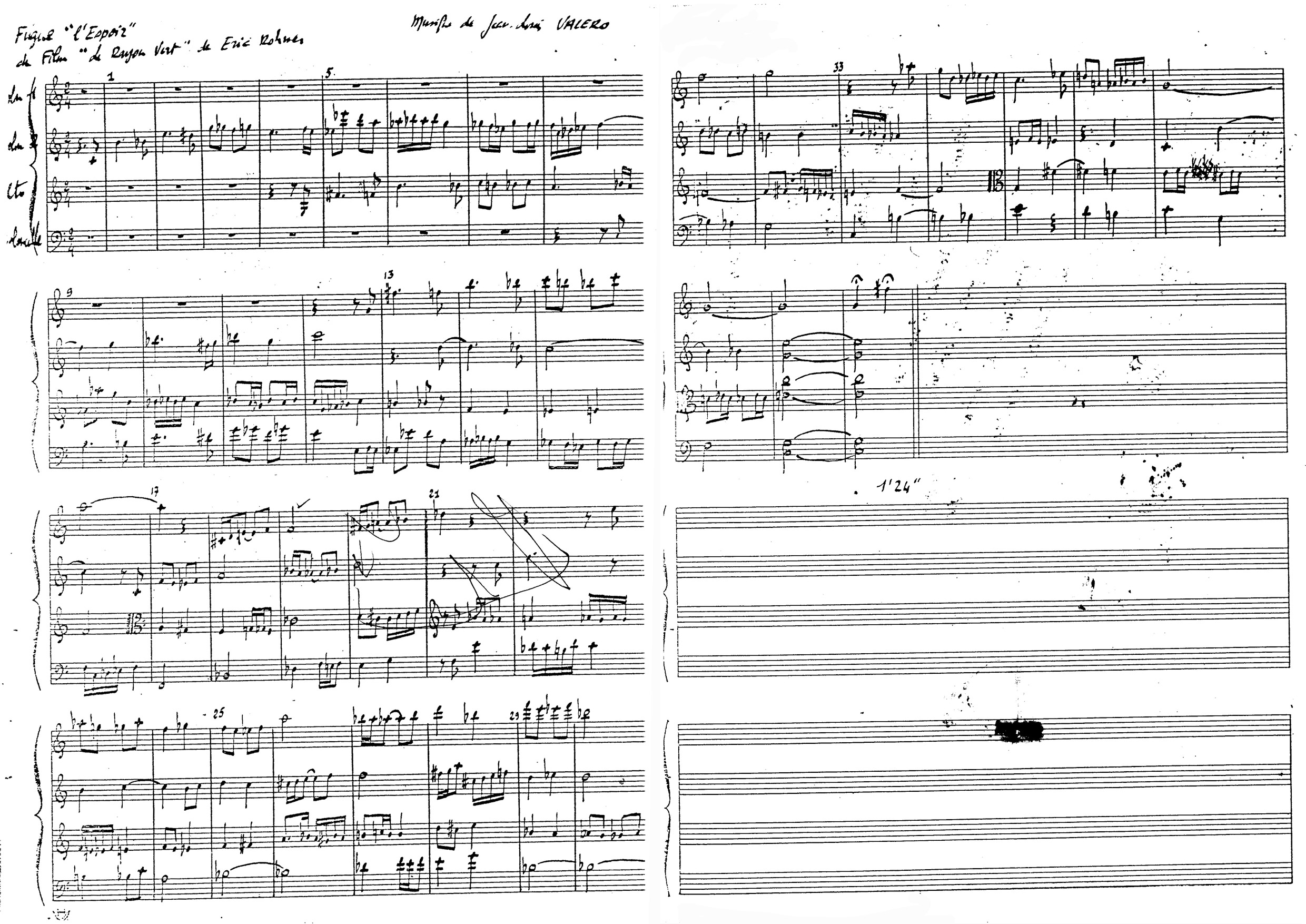 Manuscrit autographe "L' espoir", mouvement fugué de Jean-Louis Valero sur un thème d'Eric Rohmer.